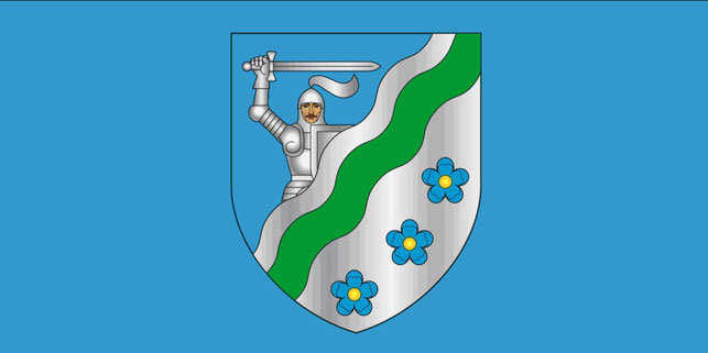 Сцяг Магілёўскага раёна